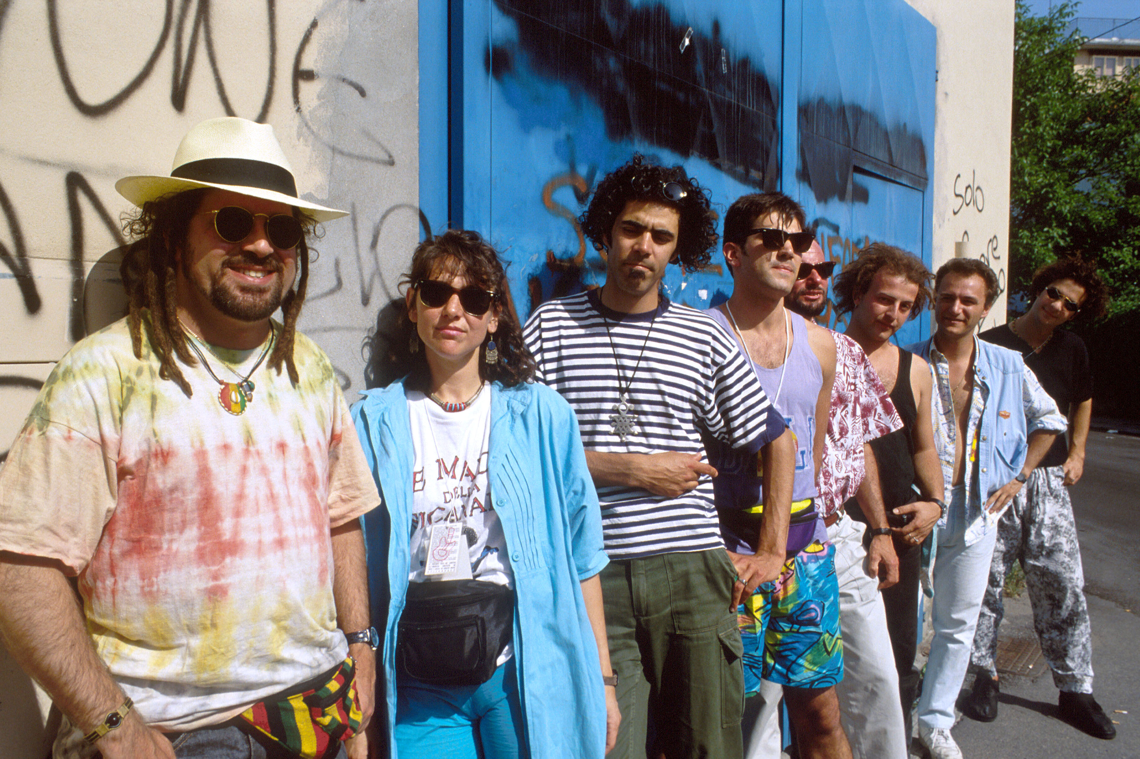 Il gruppo raggae veneziano dei Pitura Freska. Da sinistra: Skardy, Daniela Rando, Furio, Verardo, Costantini, Duse, Ciuke, Voleno